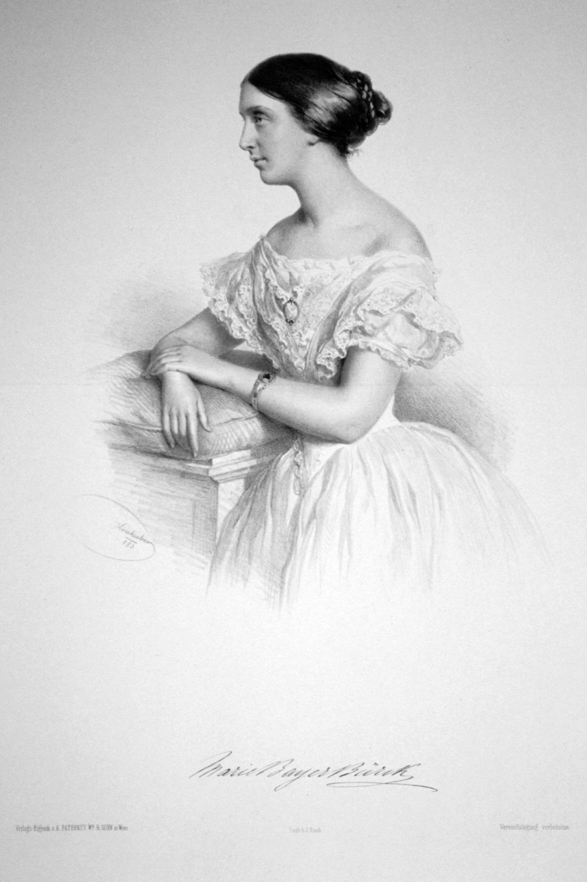 Marie Bayer-Bürck (1820–1910), deutsche Schauspielerin. Lithographie von Josef Kriehuber, 1853